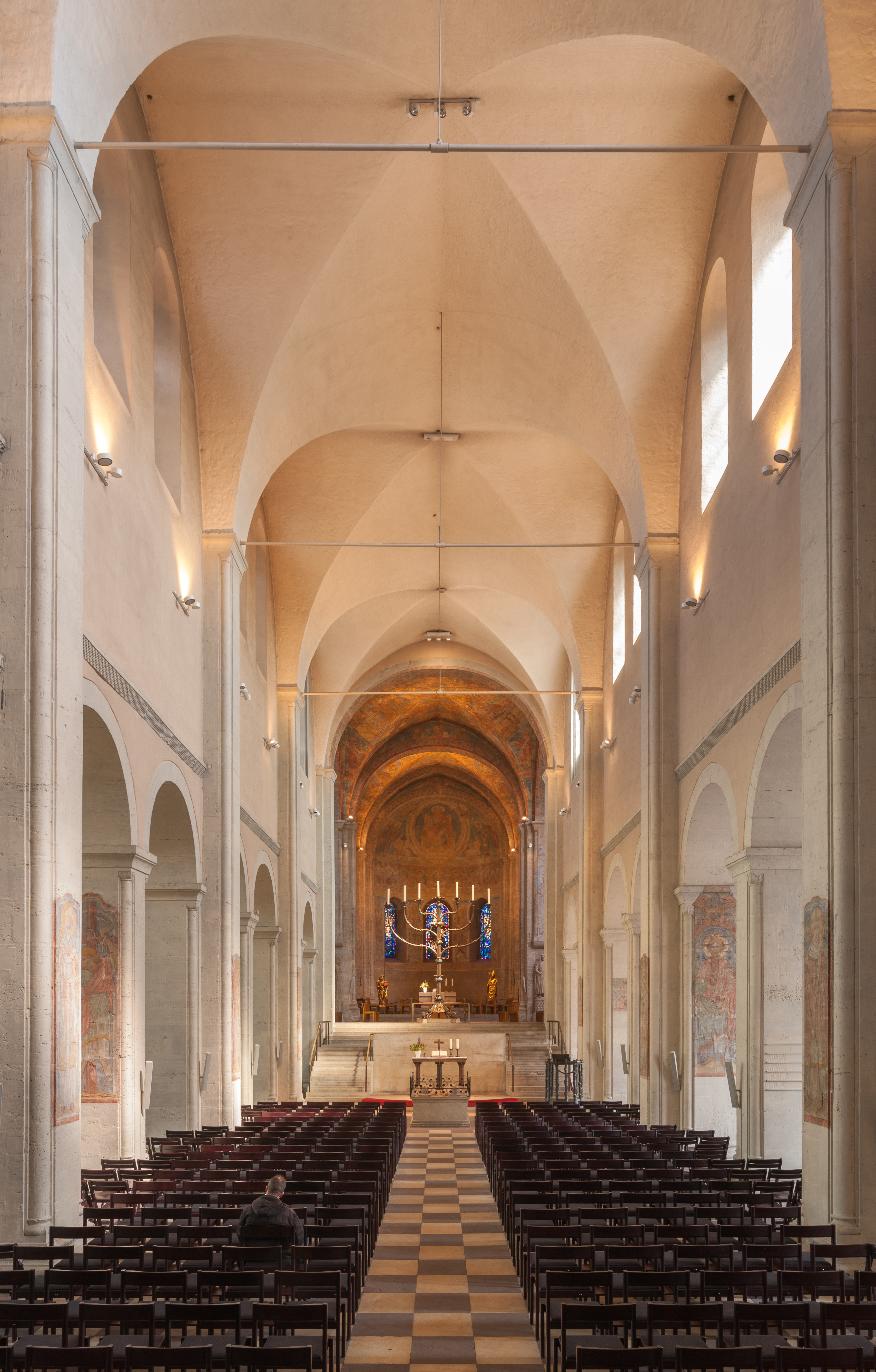 Braunschweiger Dom, Hauptschiff Blickrichtung Altar, Niedersachsen/Deutschland